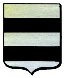 Wapenschild van Diest